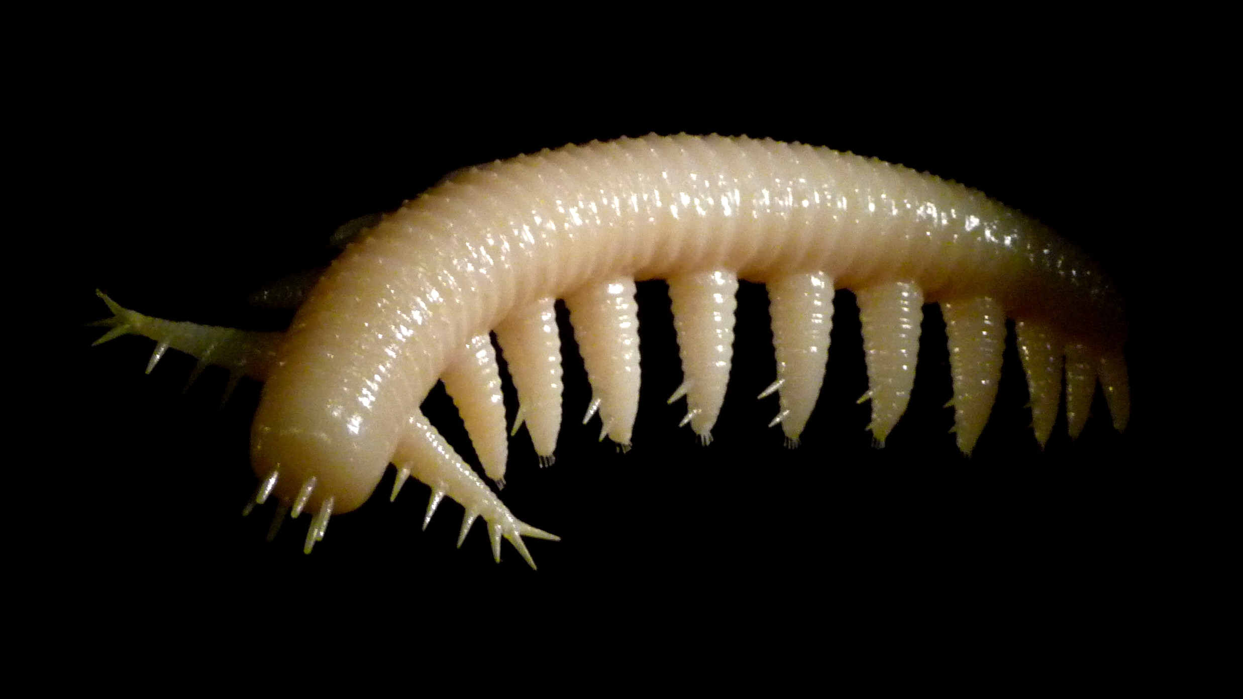 Aysheaia moulage de fossile et reconstitution